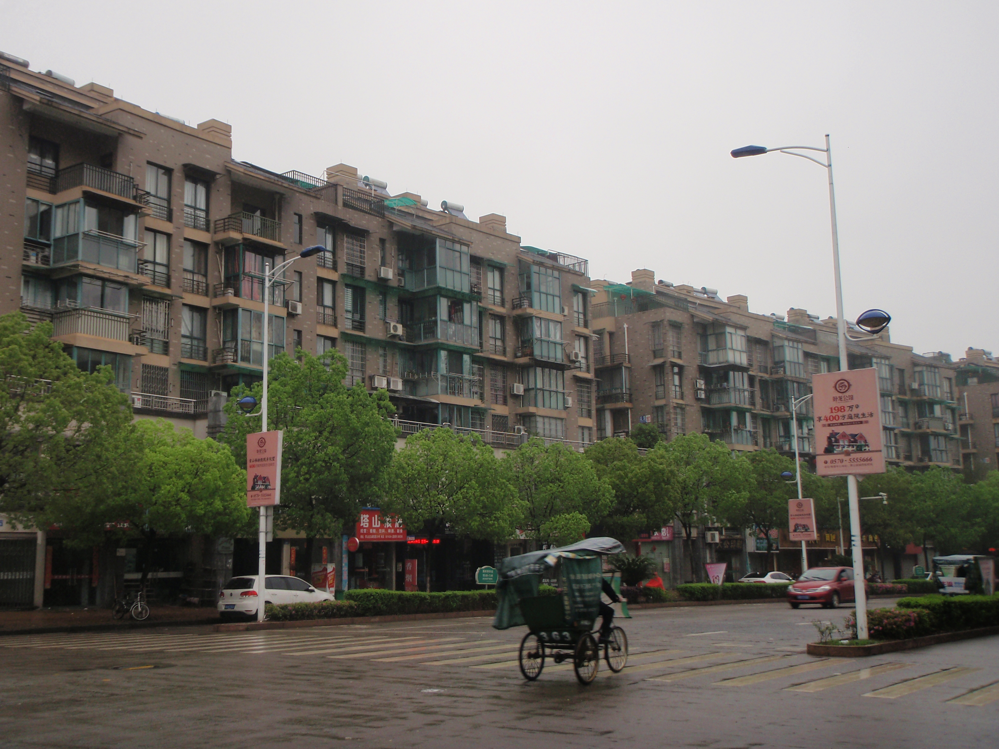 常山人民路上